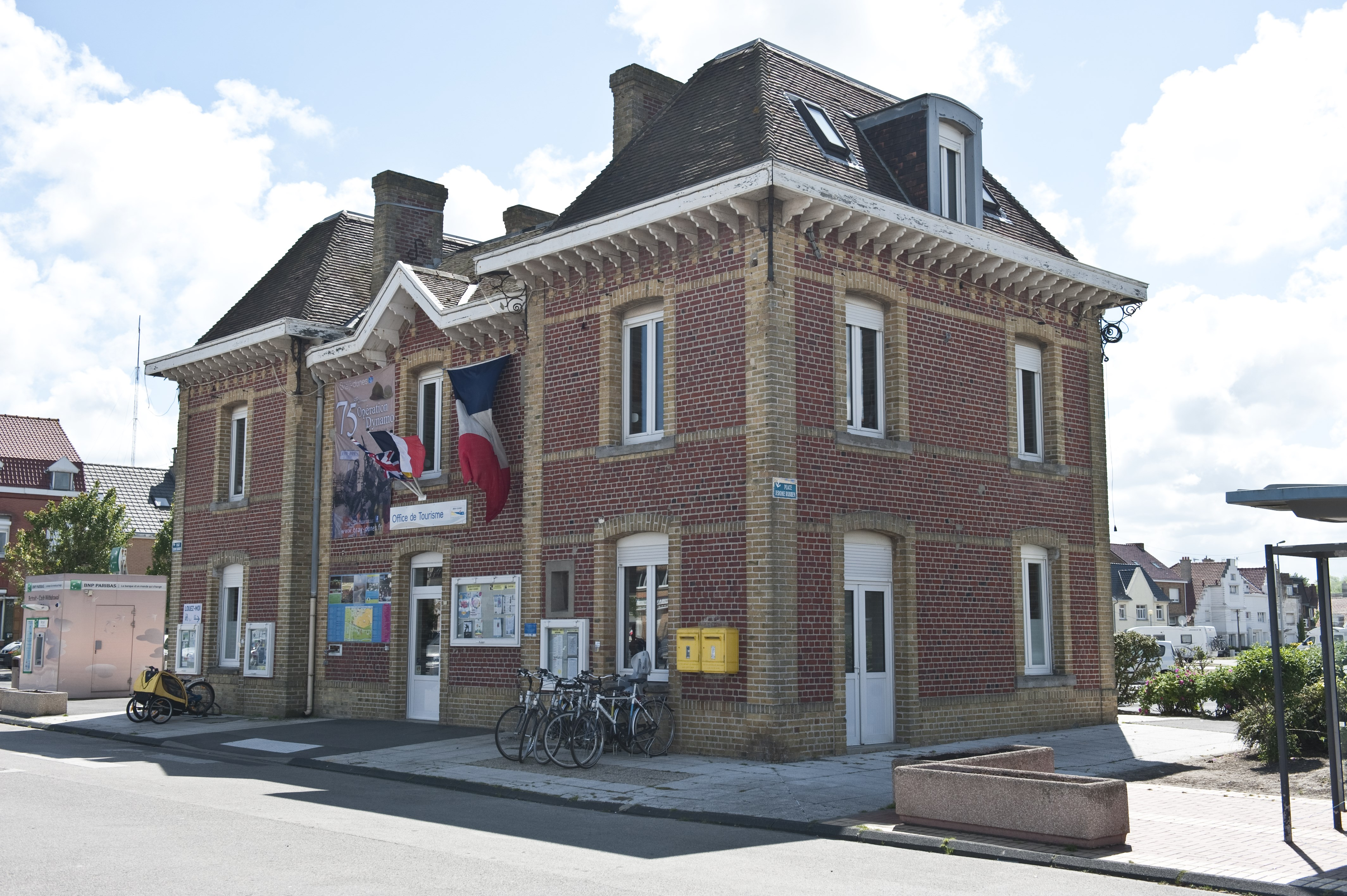 Bâtiment de l'office de tourisme de Bray-Dunes, place Jerome Rubben